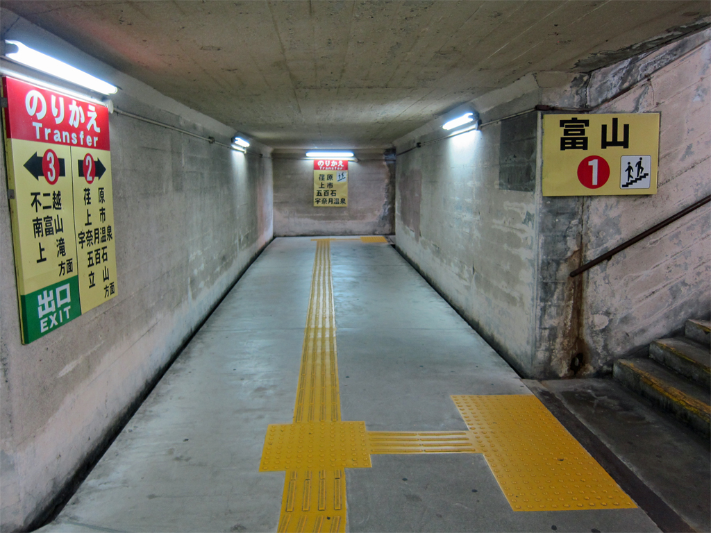 富山地方鉄道稲荷町駅 地下道